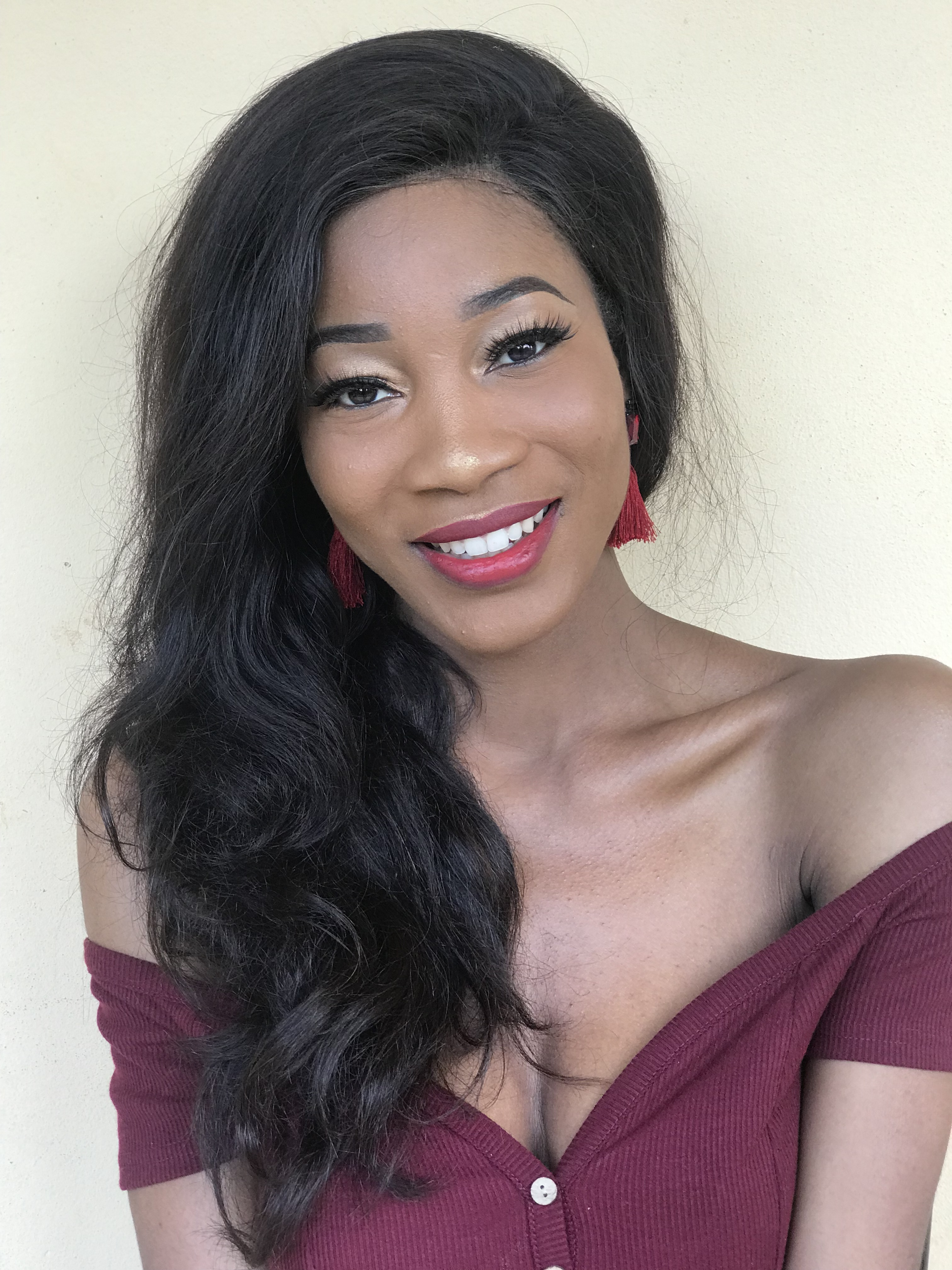 apres une belle mise en beaute , la Miss Cameroun 2015 pose, tout sourire pour la camera